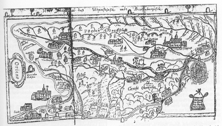 Karte Umgebung Kloster Grafschaft 1697 (Vogtei Grafschaft, Gericht Oberkirchen), Germany.